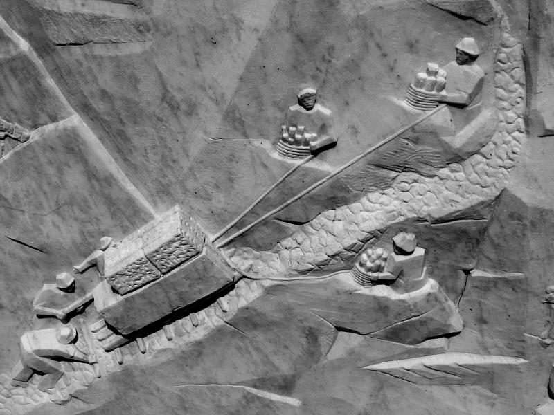 Monumento al cavatore - Colonnata (Carrara) in Toscana, Italia.